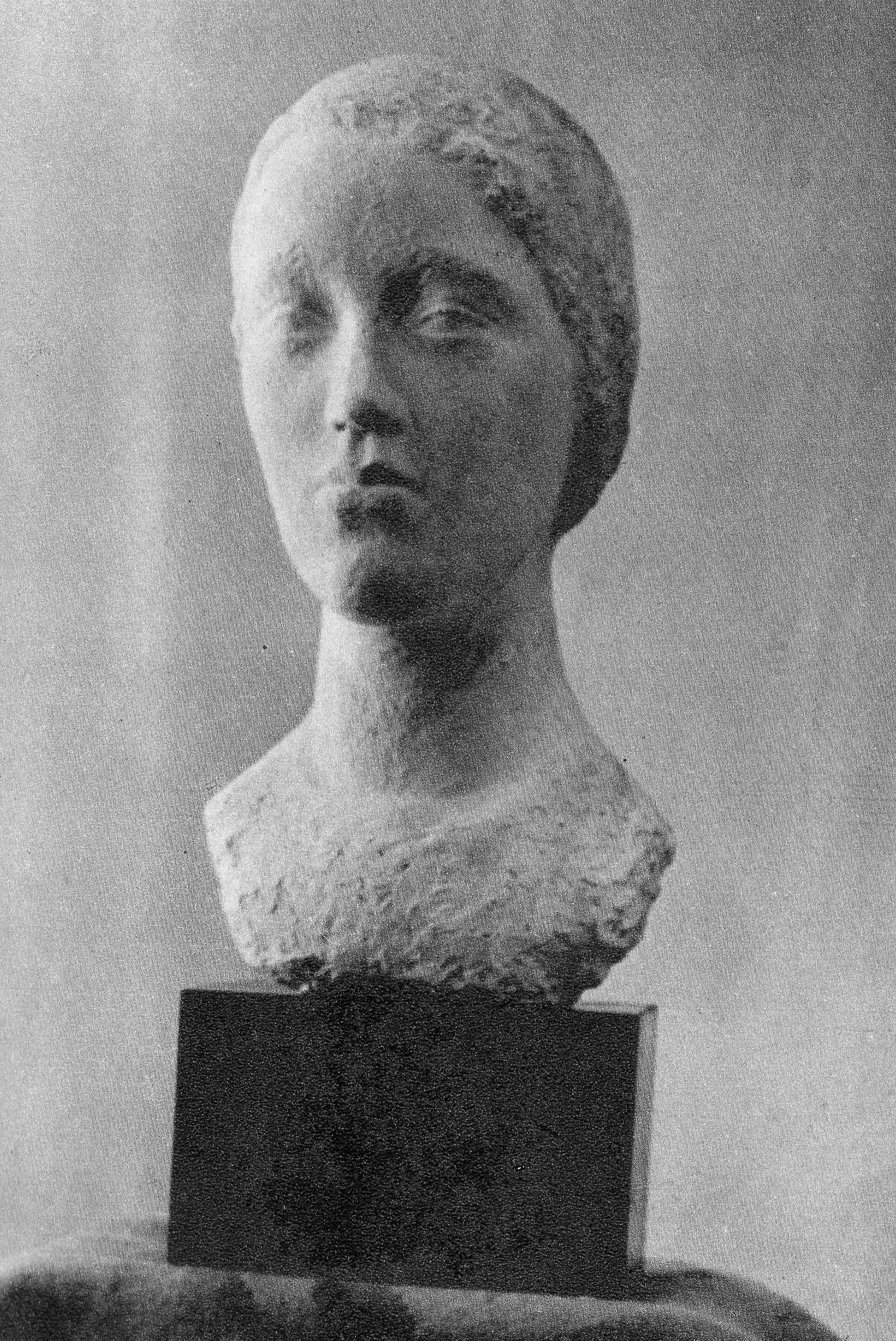 Zofia Woźna, Głowa dziewczynki, 1954r.